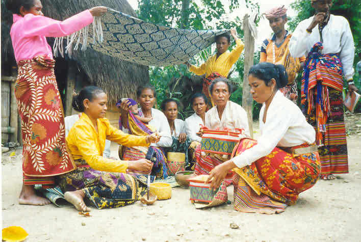 Szene Geburtsritual, Niki-Niki Un, Amanuban Tengah